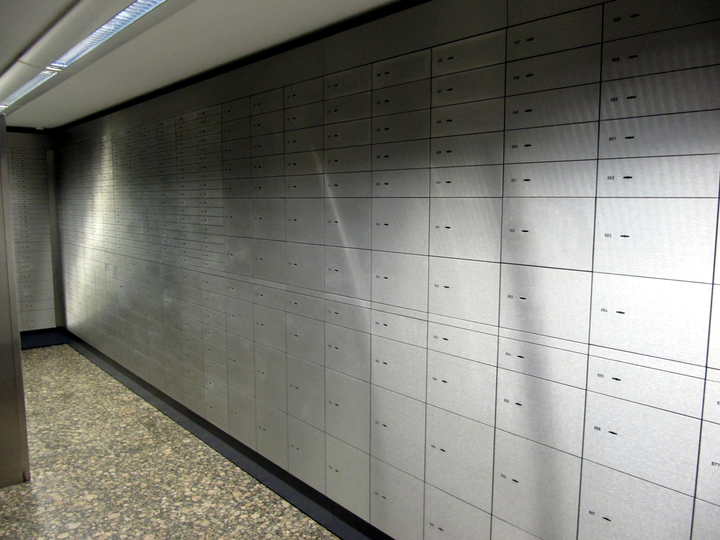 Tresorraum_Deutschland_5